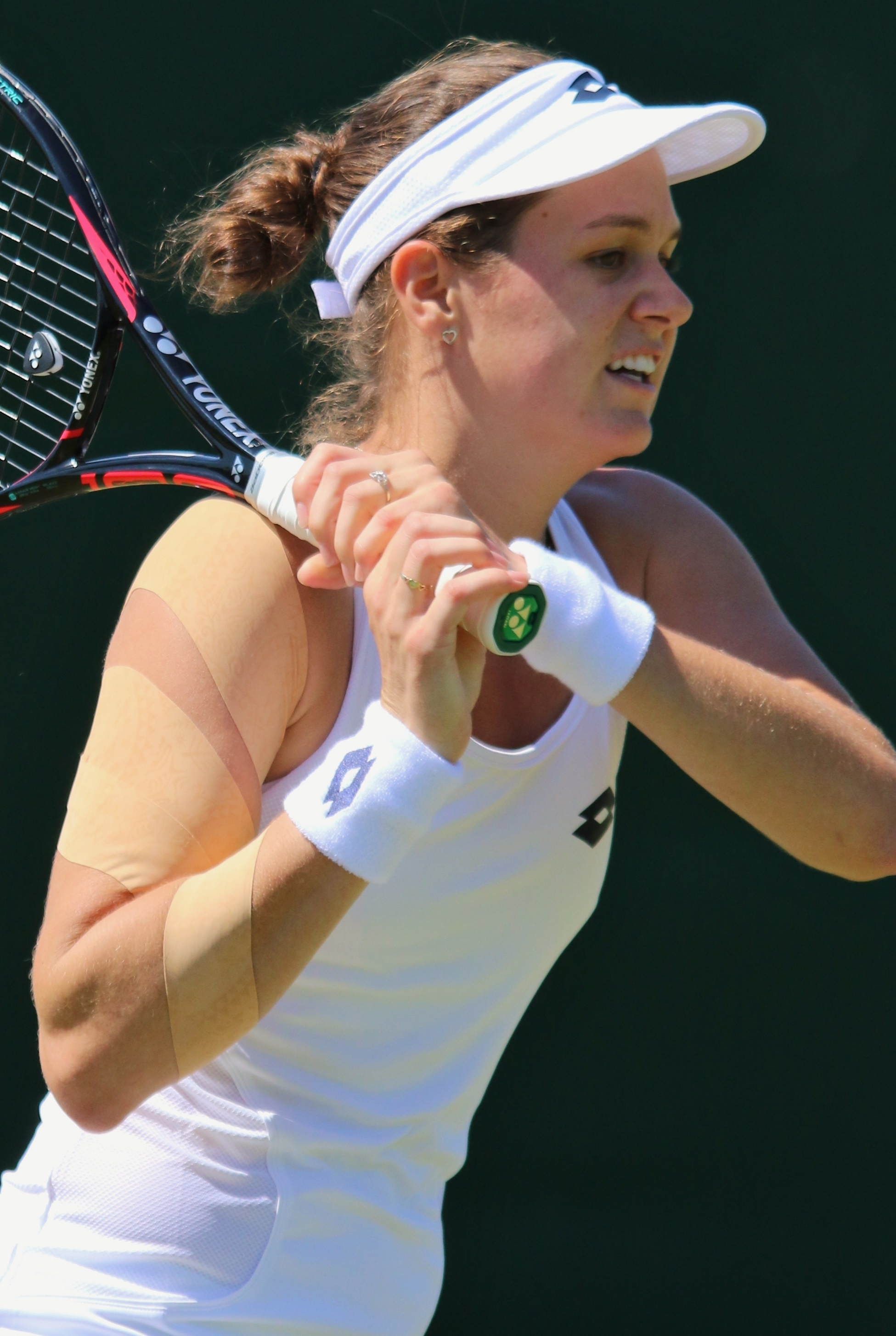 Cepelova WMQ18 (5)